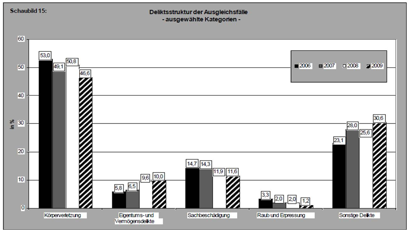 Die Statistik beschreibt für die Jahre 2006-2009 die Art der begangenen Delikte, in denen es später zu einem Täter-Opfer-Ausgleich gekommen ist